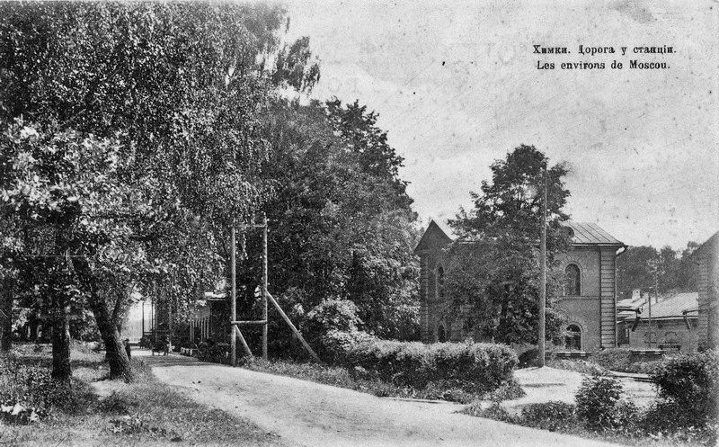 Дорога у станции Химки (ныне Железнодорожная улица)